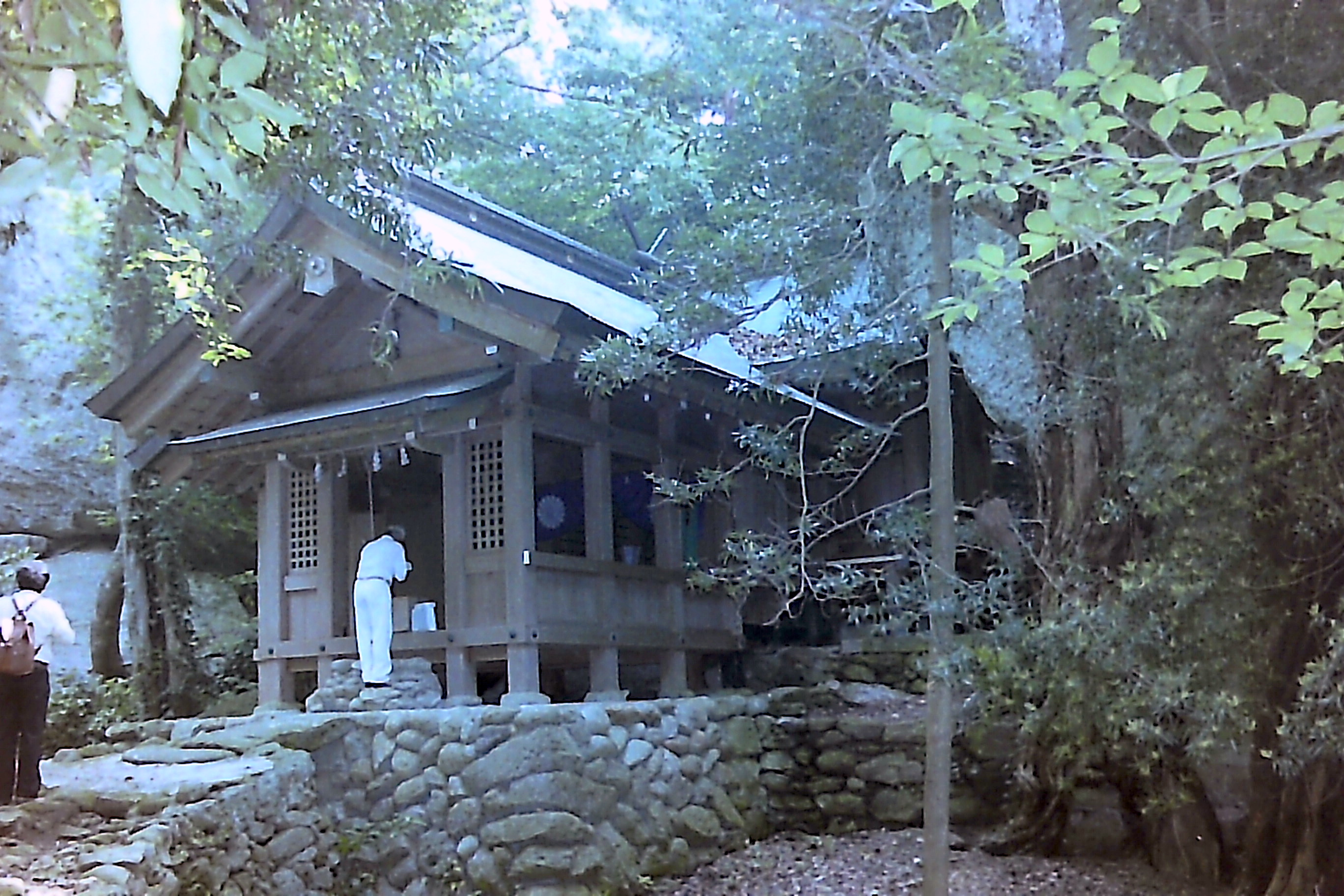 女人禁制の沖ノ島に鎮座する宗像大社の沖津宮 2007年5月27日の渡島の際に撮影（フィルムスキャナーでネガをデジタル画像化）